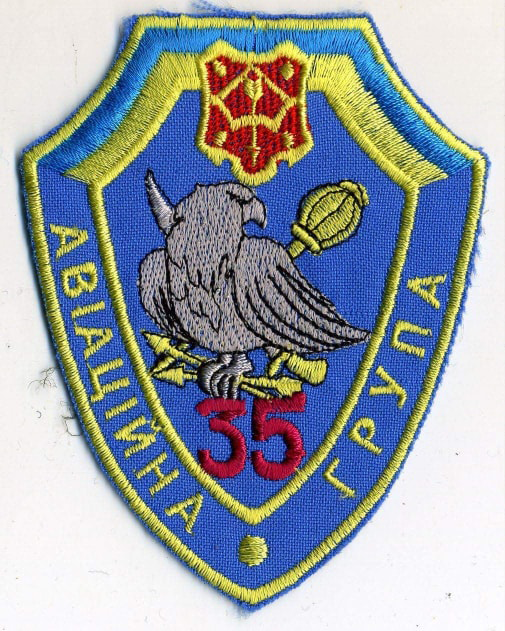 Шеврон 35-та авіаційна група (Оперативного Призначення) (скор. 35 АГ (ОП)) — оперативне авіаційне об'єднання, безпосередньо підпорядковувалося Командуванню Військово-повітряних сил України. Існувало на початку 2000-х років. Дизайн розроблено Ляховим Валерієм Борисовичем